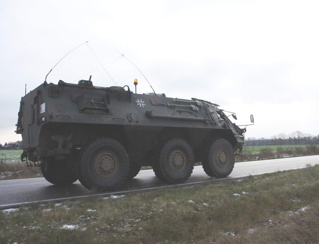 Transportpanzer Fuchs als Funkführungsfahrzeug der Panzerbrigade 12 bei einer Verlegeübung. Erkennbar am klappbaren Antennenmast auf der rechten Fahrzeugseite sowie an den drei Antennen.